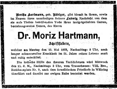 Parte Moritze Hartmanna publikované 14.5.1872 ve vídeňském tisku Die Presse